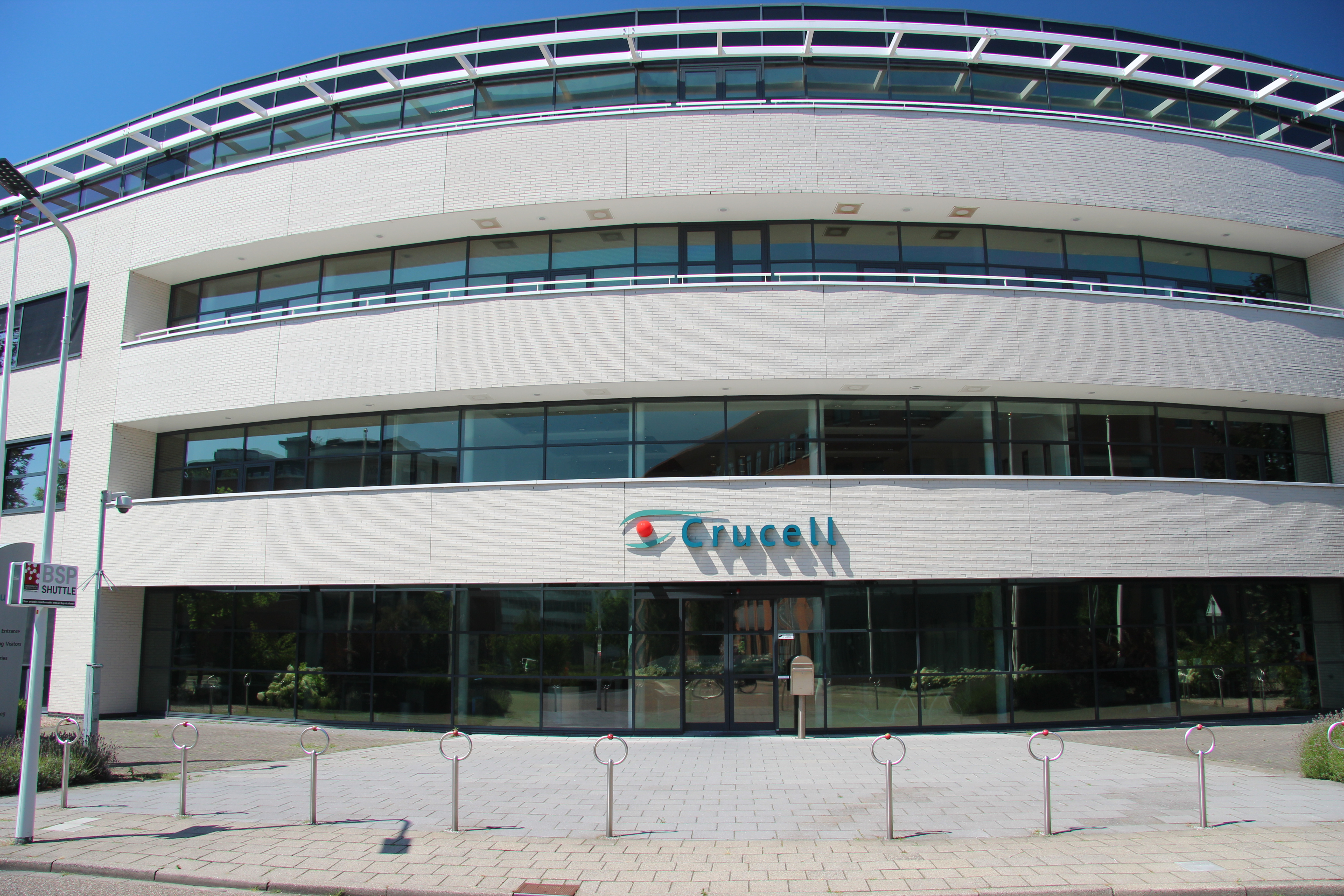 Archimedesweg 4 Leiden. Hoofdgebouw Crucell.